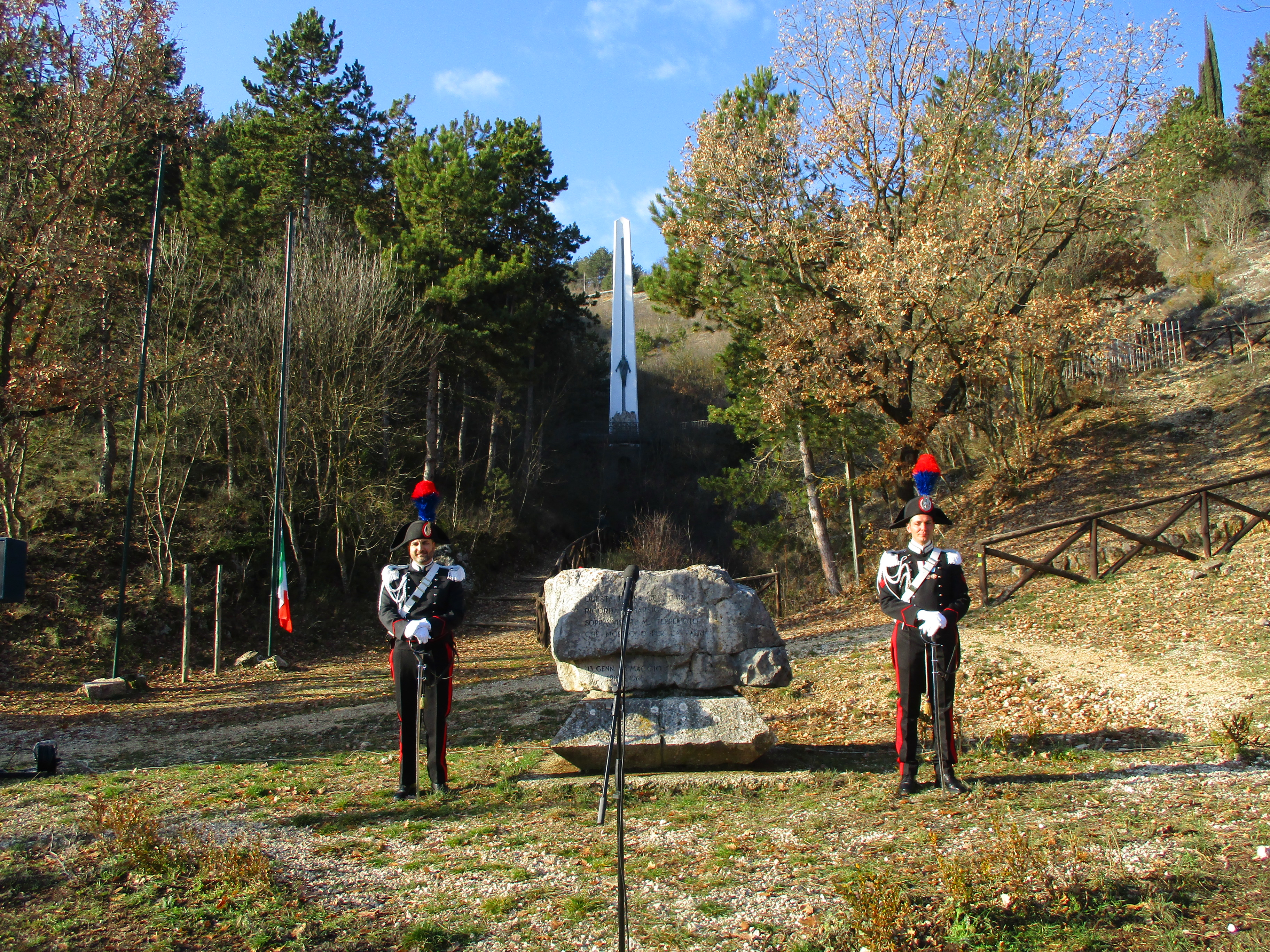 Commemorazione del 2018